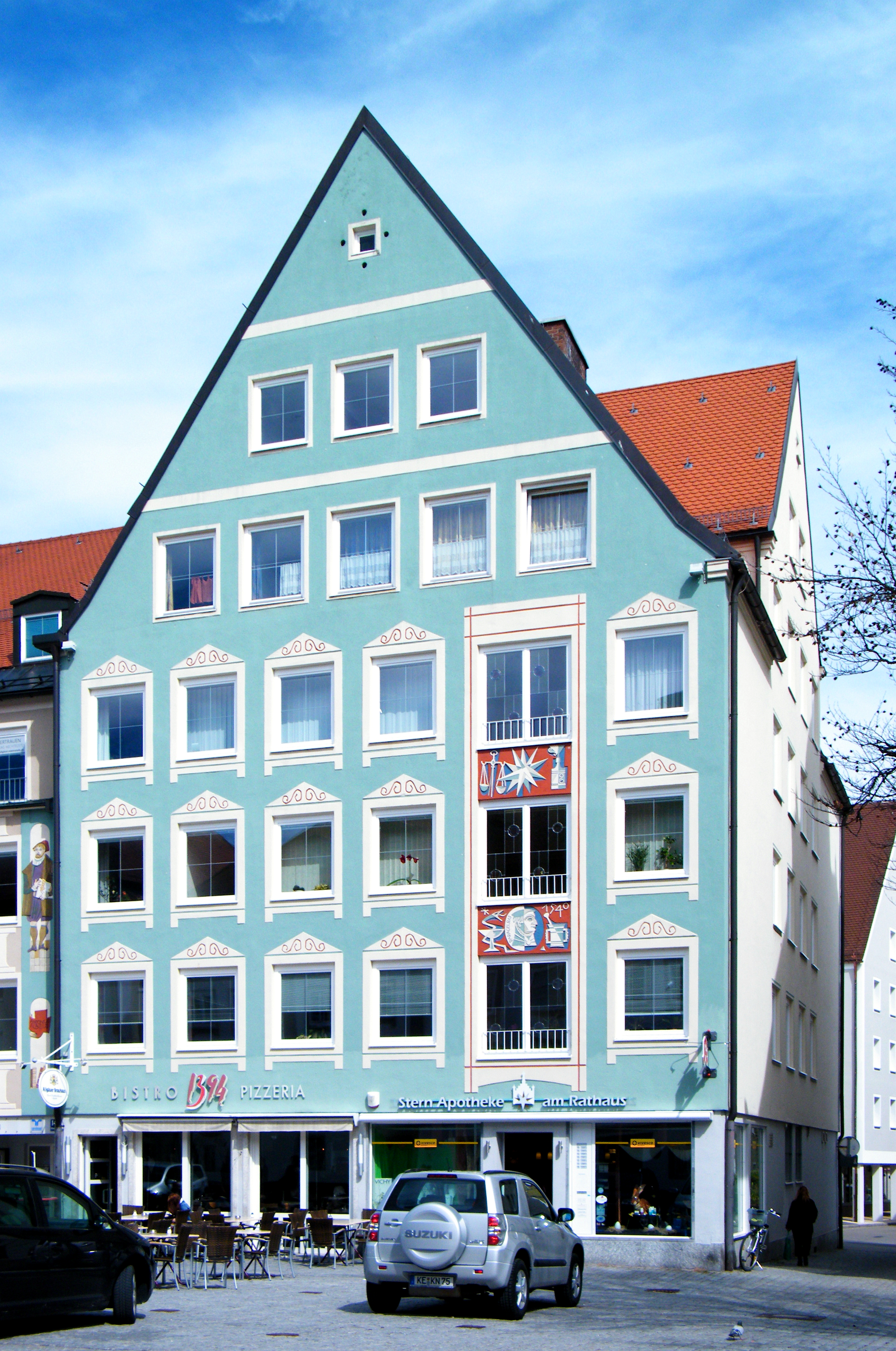 Stern-Apotheke, Neubau in Kempten